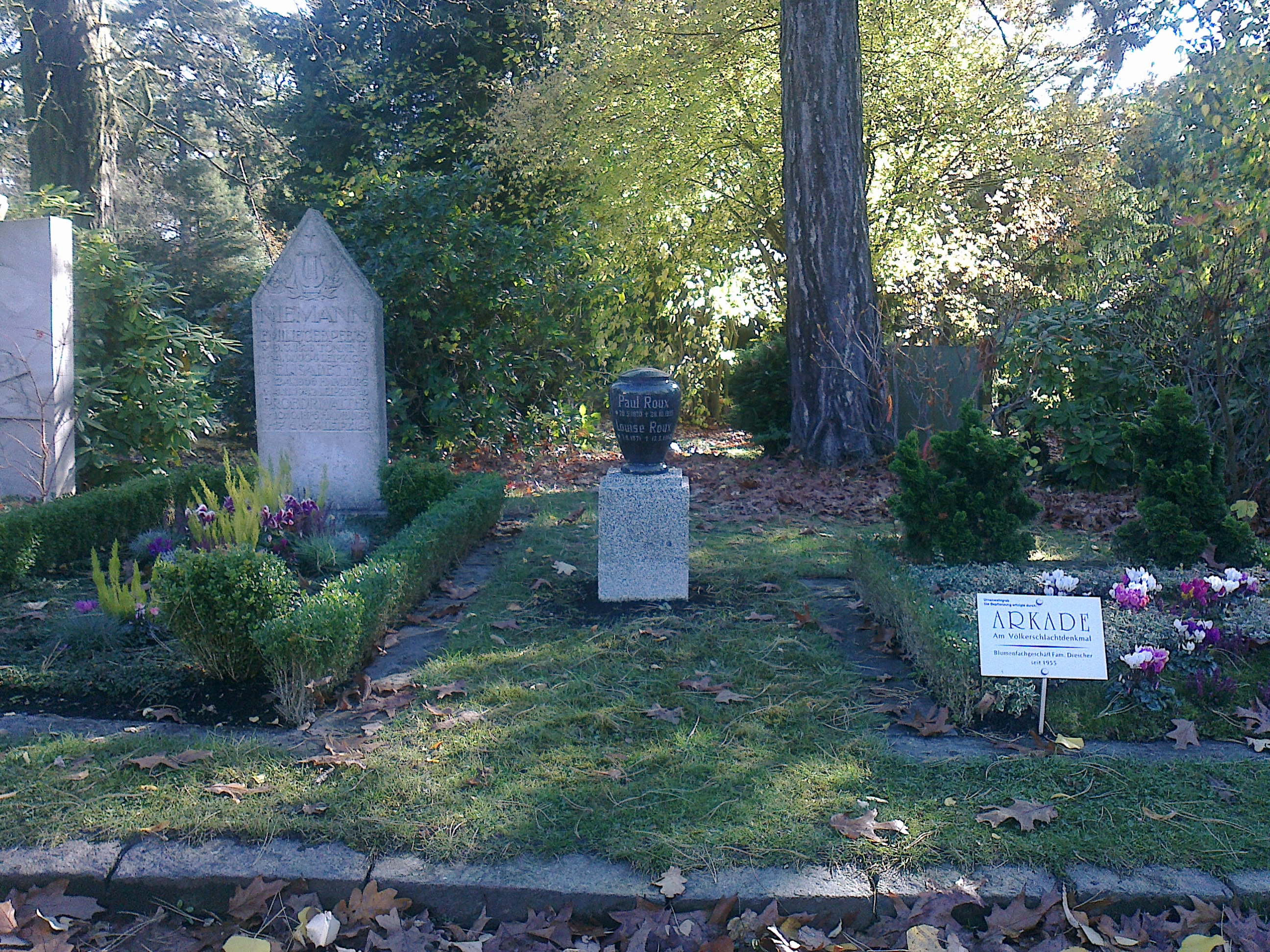 Graburne von Paul Roux und seiner Frau Louise auf dem Leipziger Südfriedhof